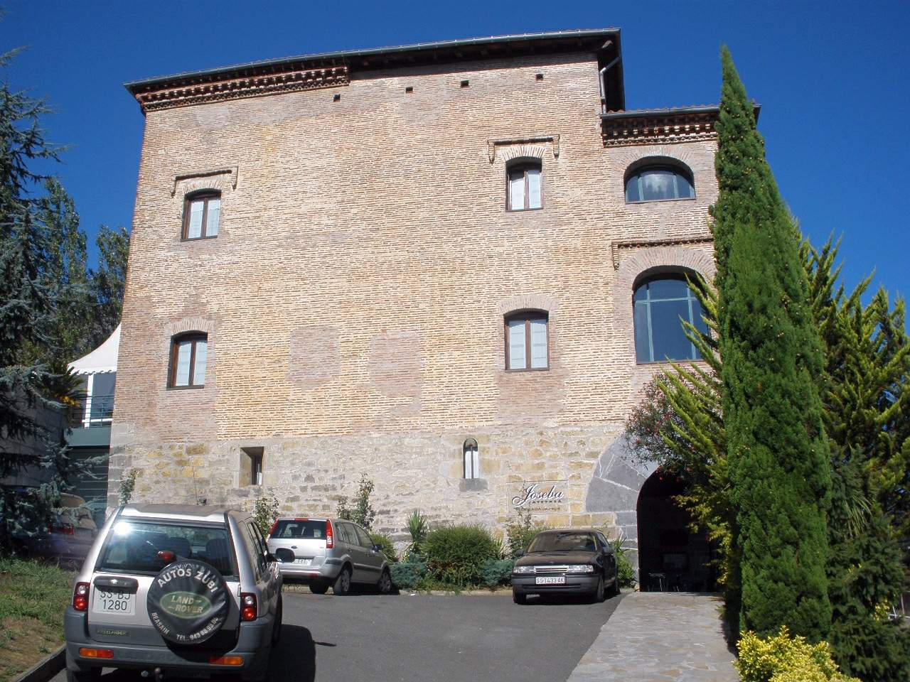 Azkoitia - Casa-Torre Floreaga